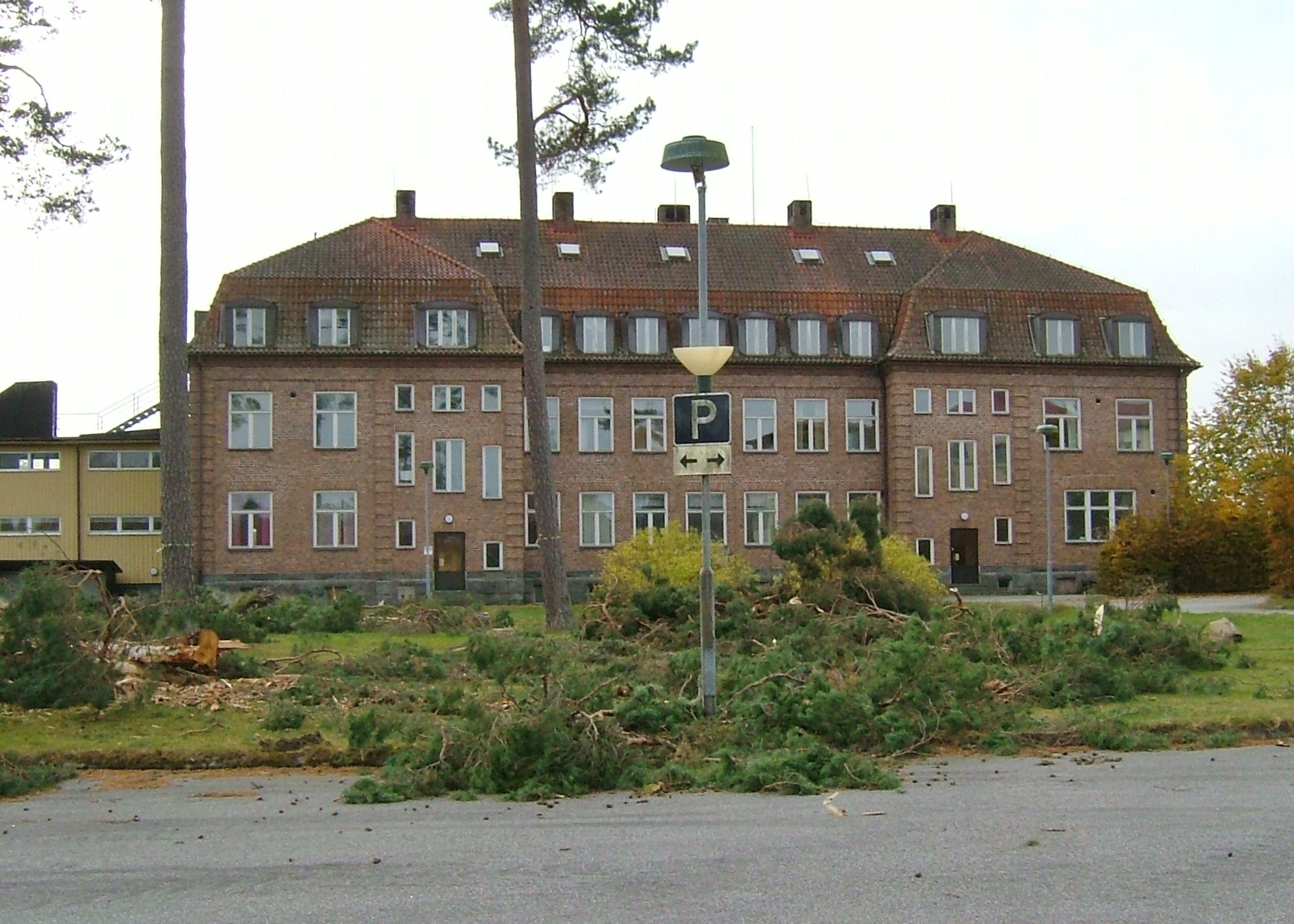 Fur f d sjukhem